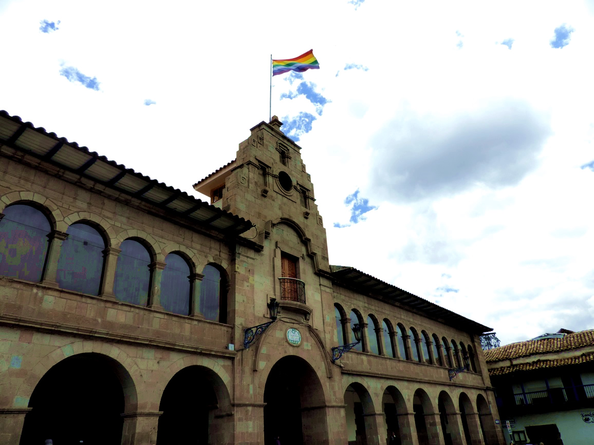 Cuzco (Peru)